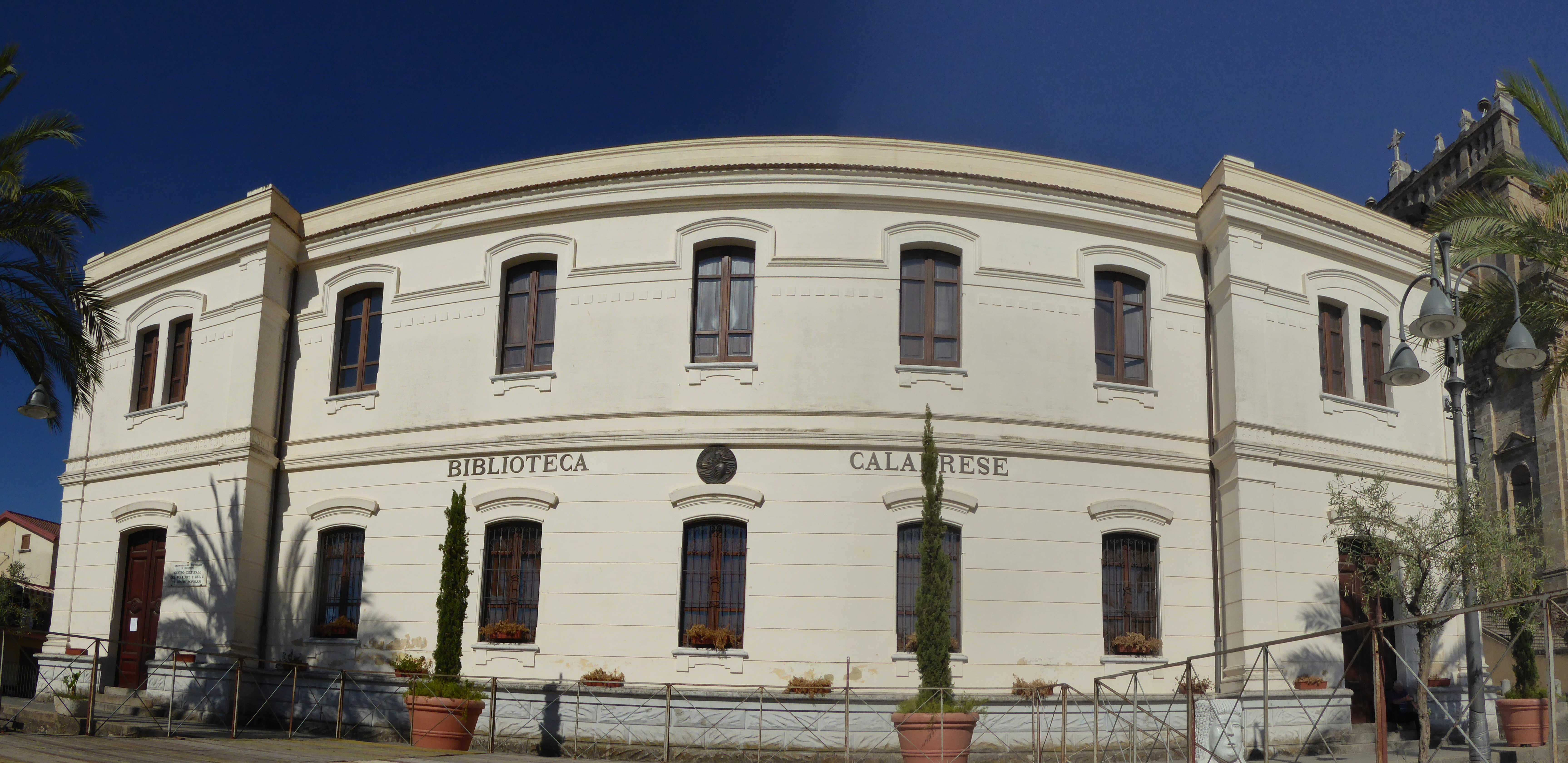 Biblioteca calabrese di Soriano (VV) - Agosto 2017